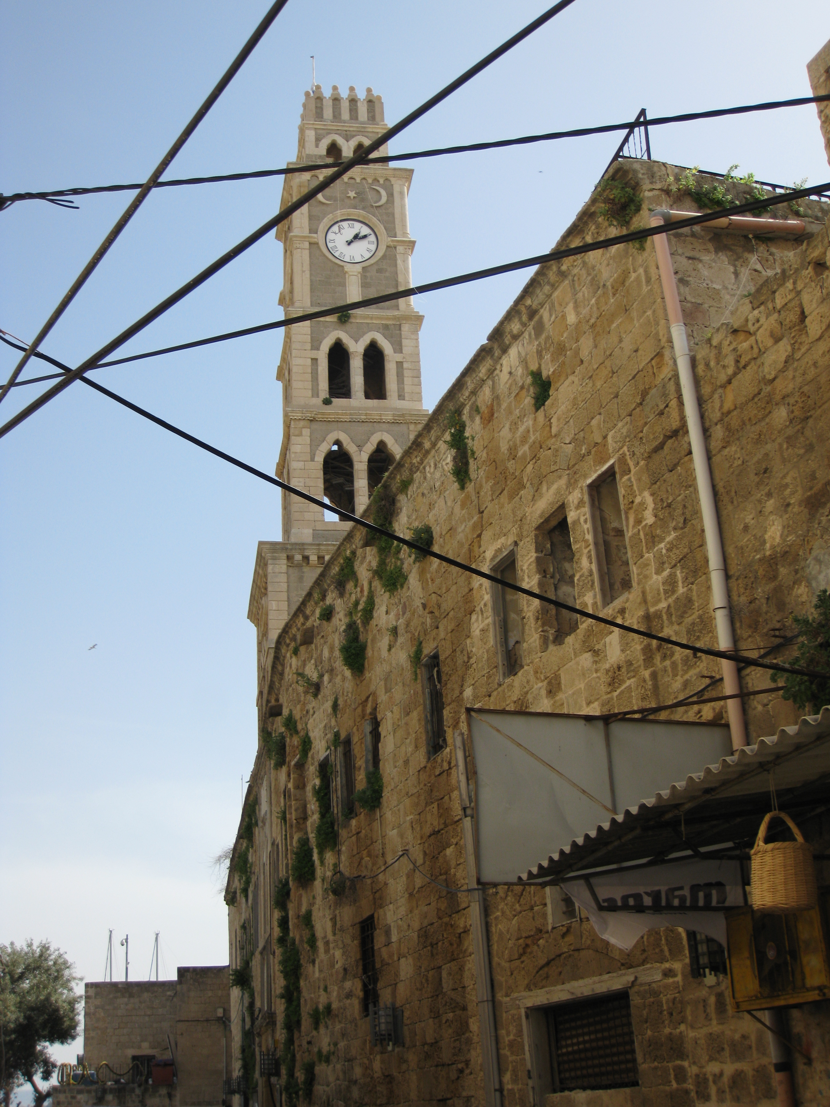 Acco (Acre, Akko) - Khan al-Umdan עכו - חאן אל עומדאן